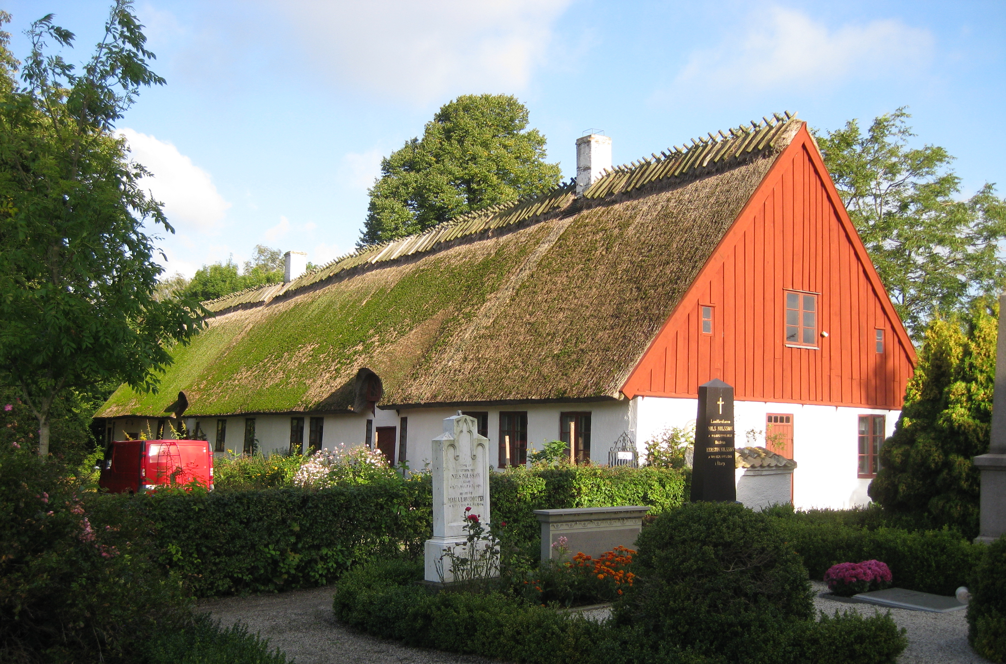 Burlövs gamla prästgård